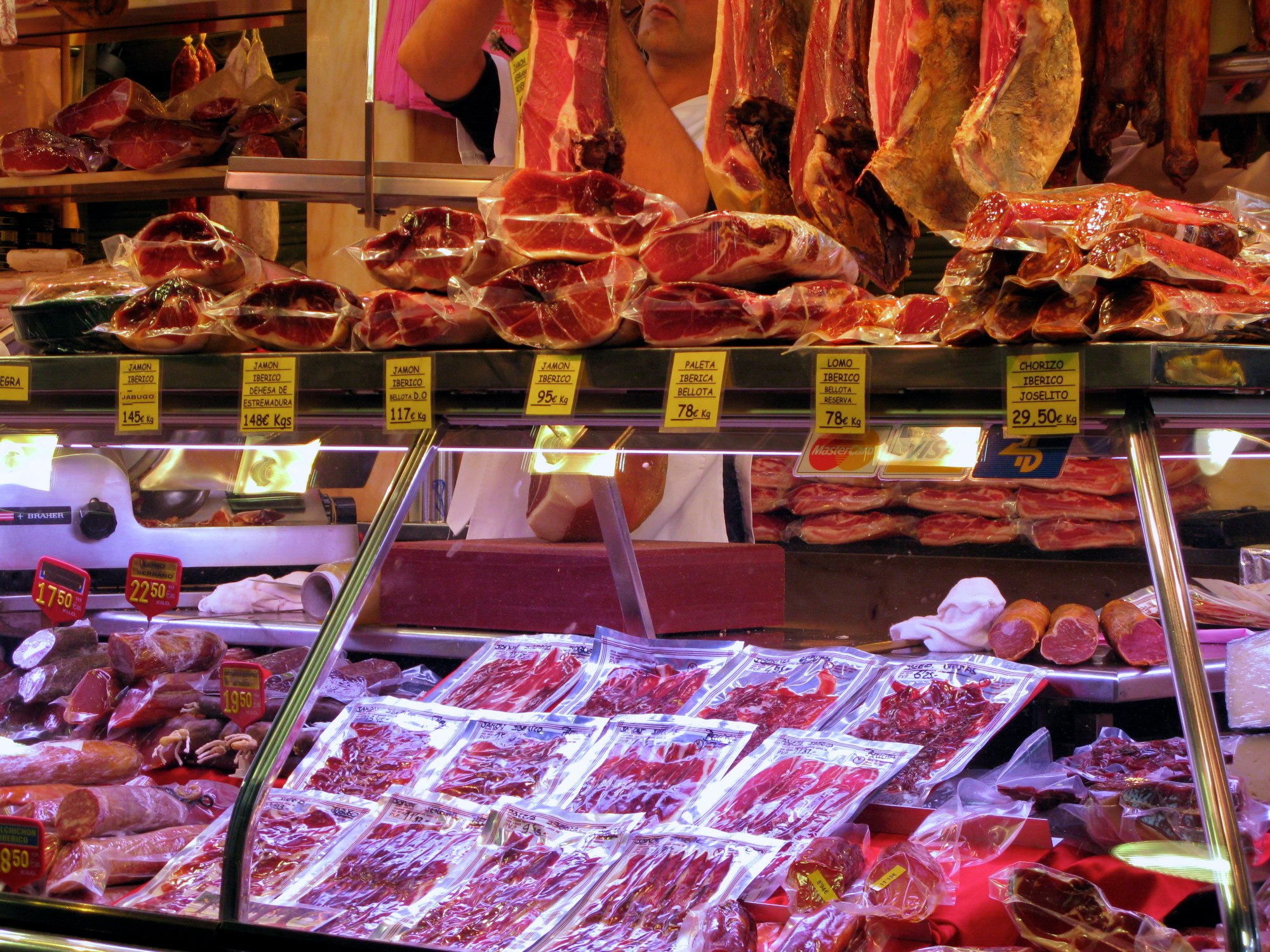 Barcelona Mercat Boqueria 9